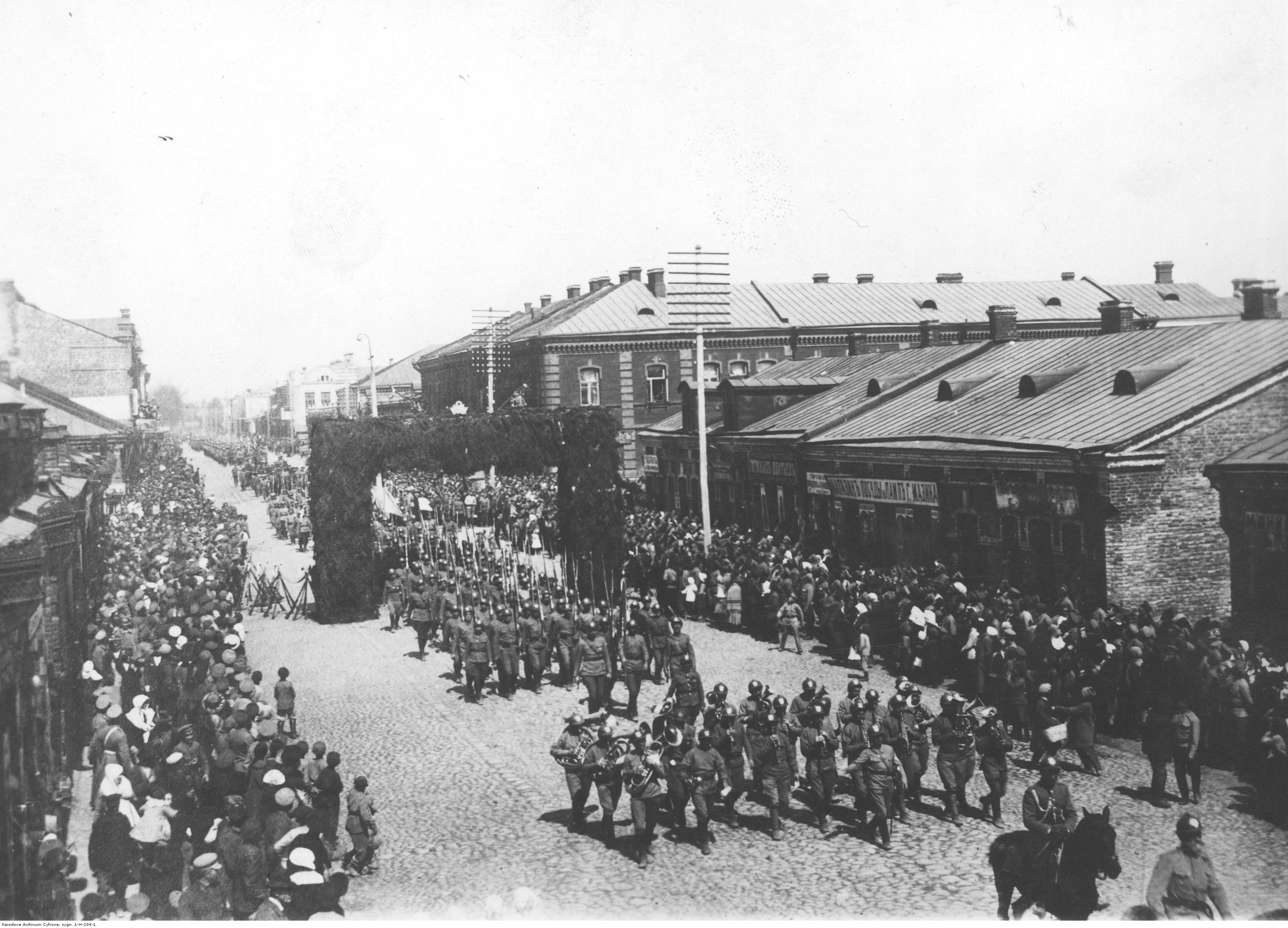 I Korpus Polski w Rosji - uroczystość Święta 3 Maja; Bobrujsk 1918 r. Koncern Ilustrowany Kurier Codzienny - Archiwum Ilustracji. Sygnatura: 1-H-234-1